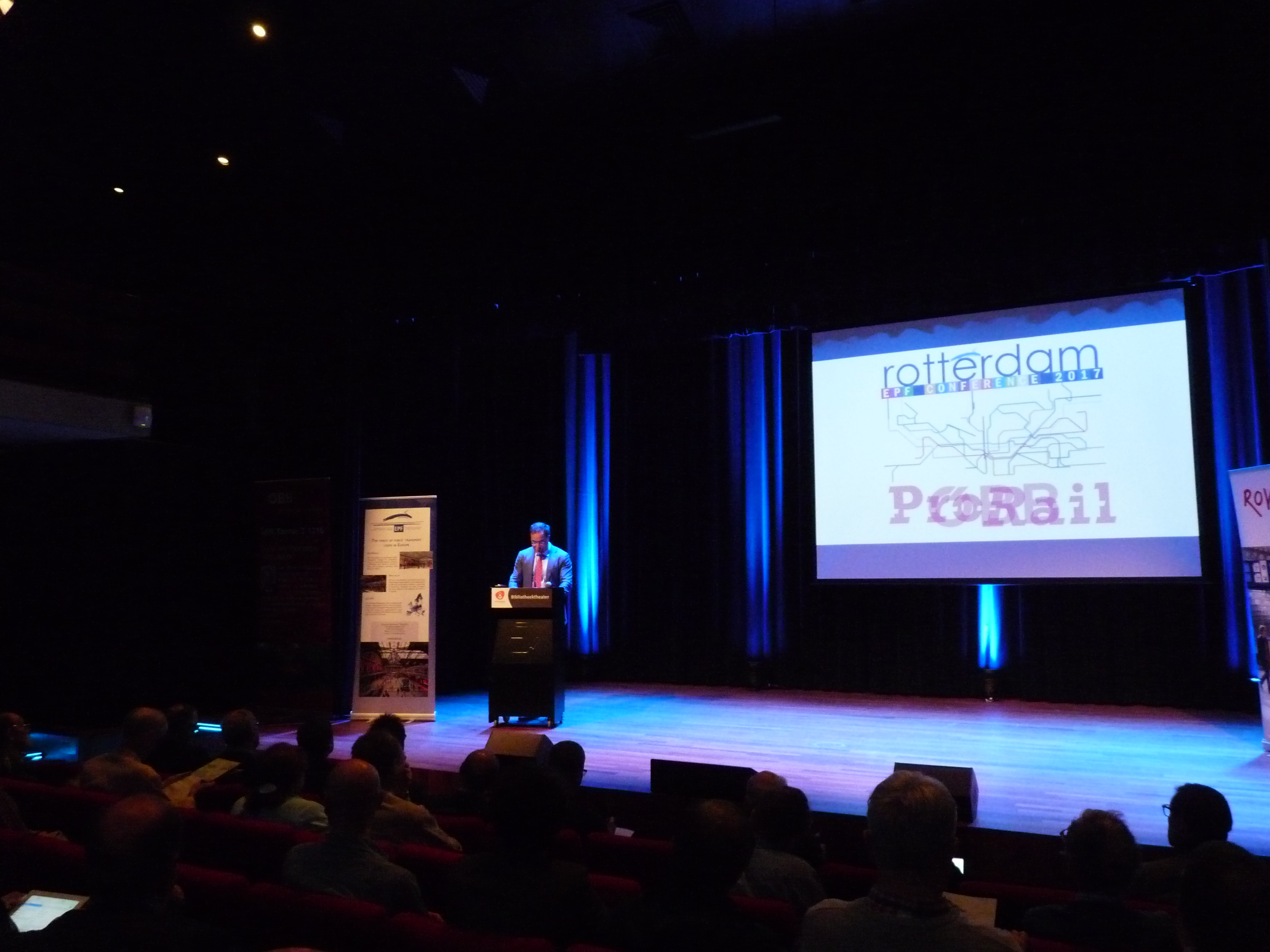 De EPF Rotterdam conferentie op zaterdag in de Bibliotheek theater.